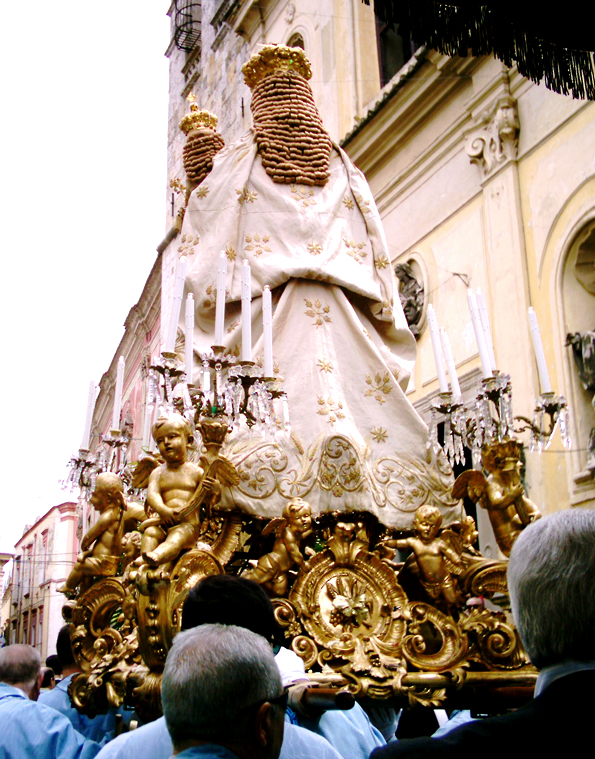 Festa del Soccorso a San Severo: la statua della Madonna nera attraversa piazza della Repubblica. È visibile il grande fercolo dorato ottocentesco. Foto personale (2004). Categoria:San Severo